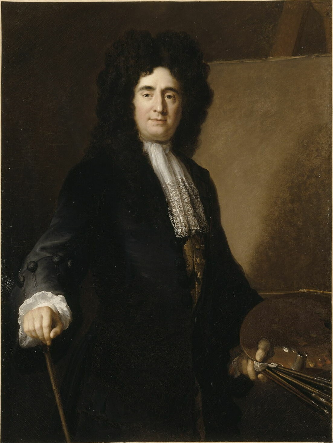 Portrait of François de Troy